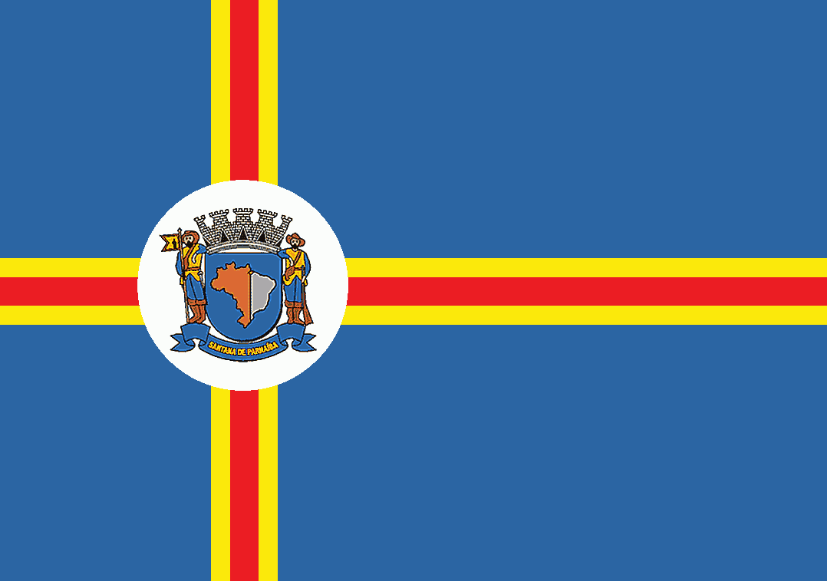 Bandeira de Santana de Parnaíba, município de São Paulo, Brasil.